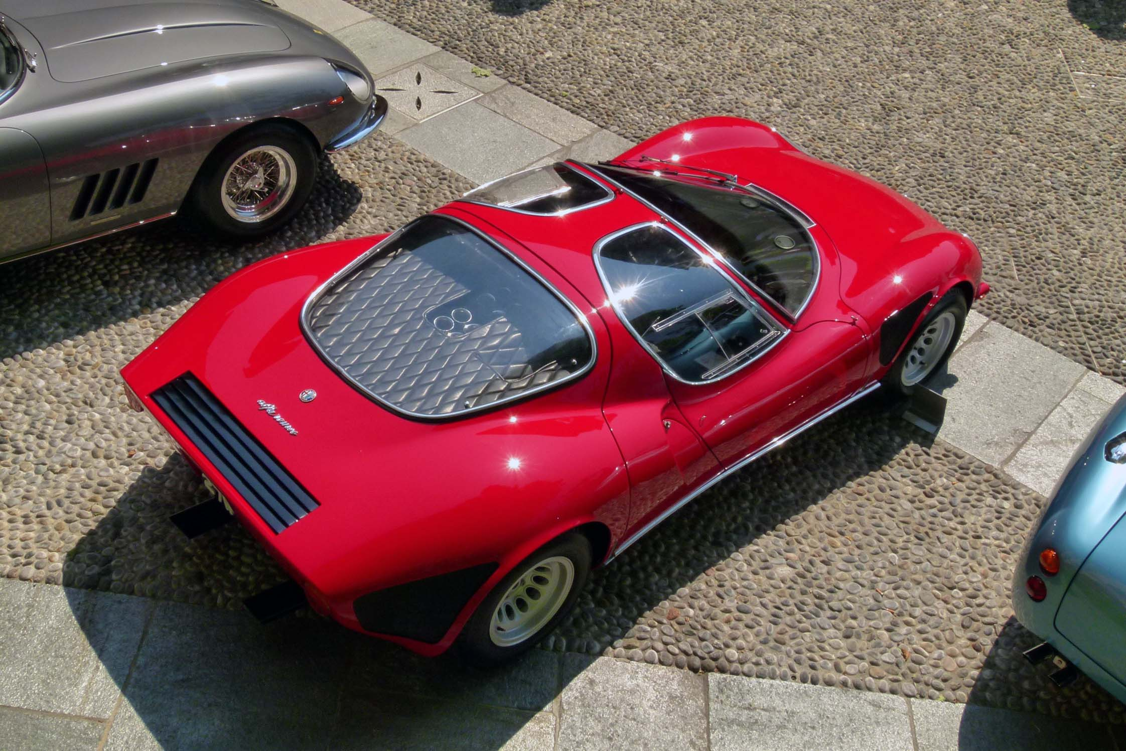 bolide exposé au Torcy road show en 2010 sur Bay 1